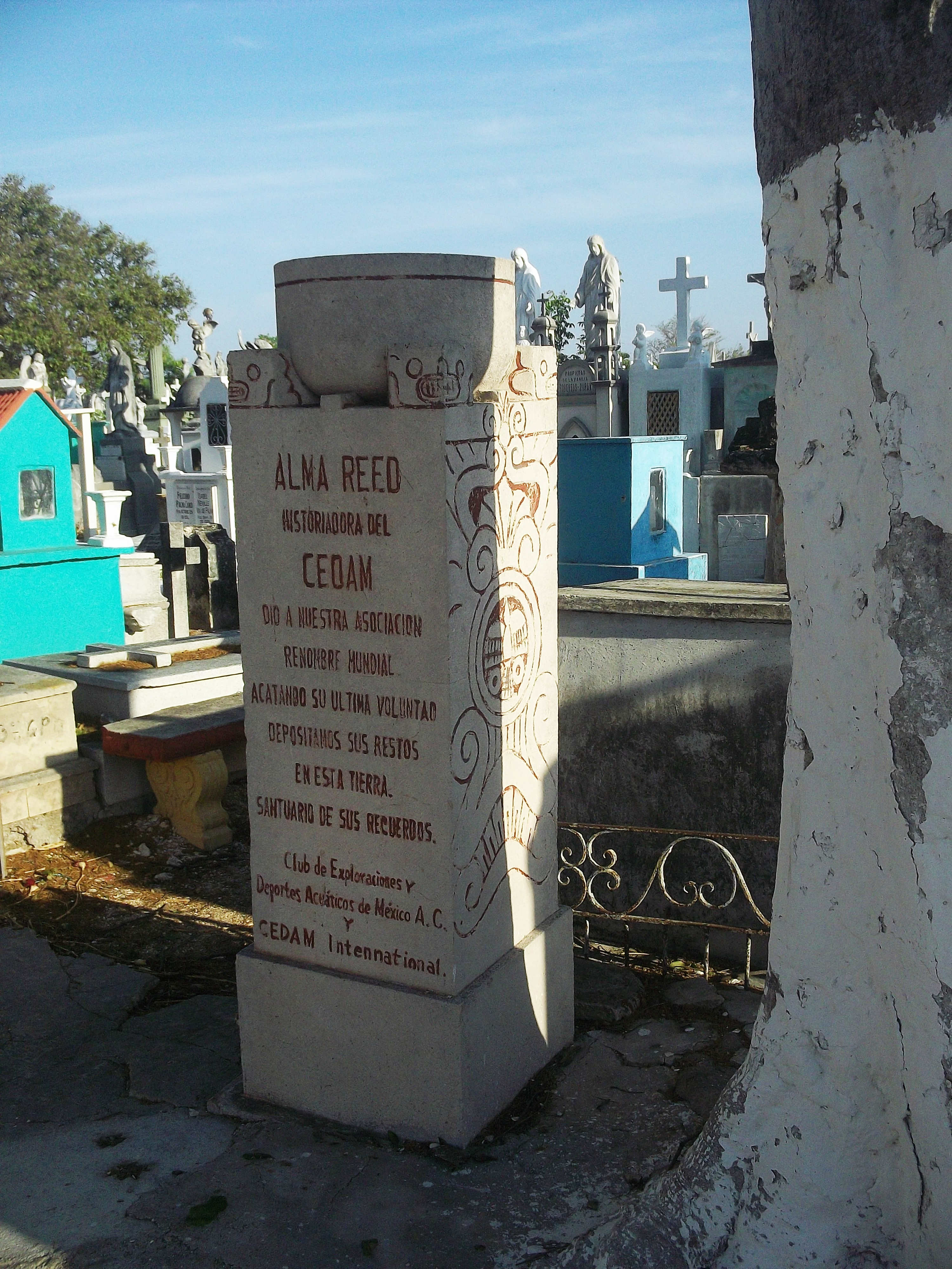 Tumba de Alma Reed, Cementerio General, Mérida, Yucatán.